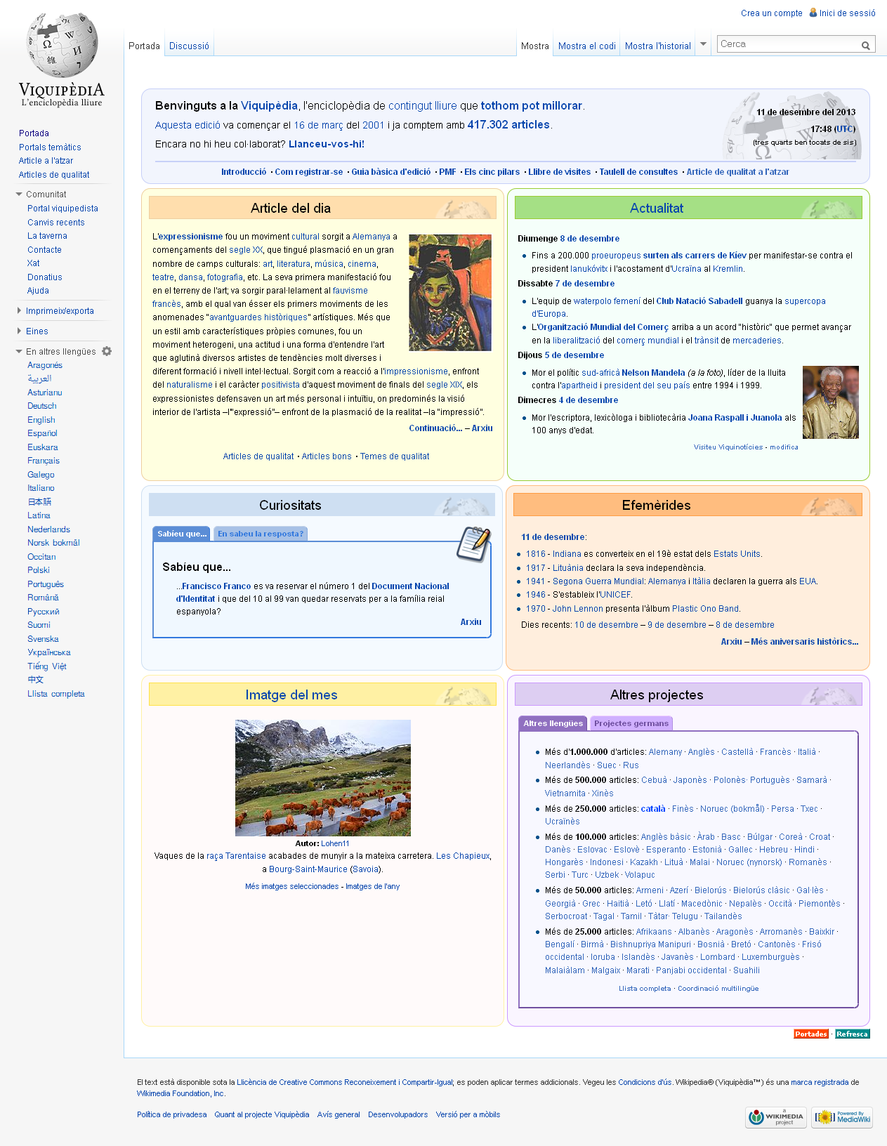 Screenshot - Hlavní strana katalánské Wikipedie ze dne 7. května 2013